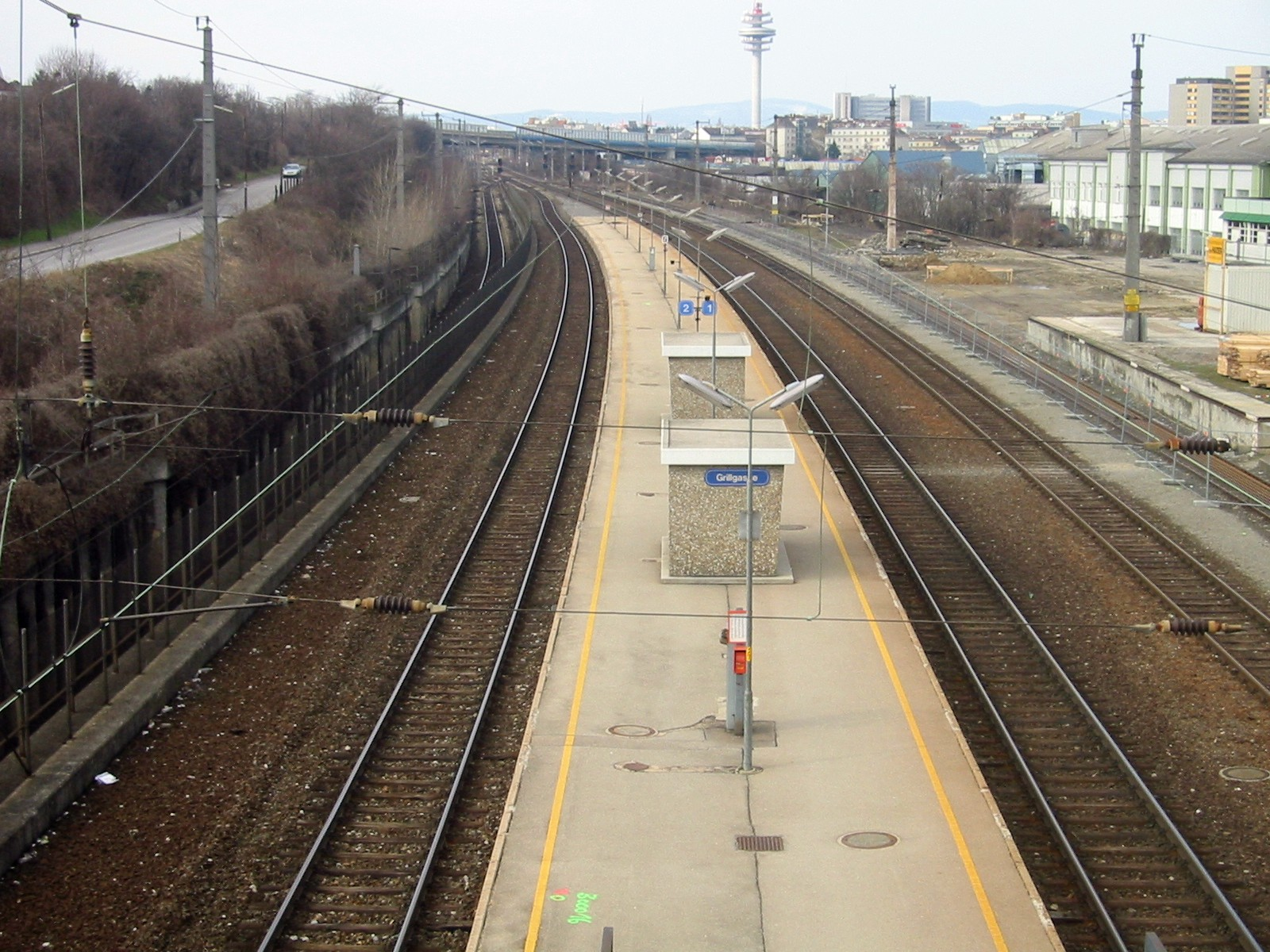 Wien, S-Bahn-Station Grillgasse